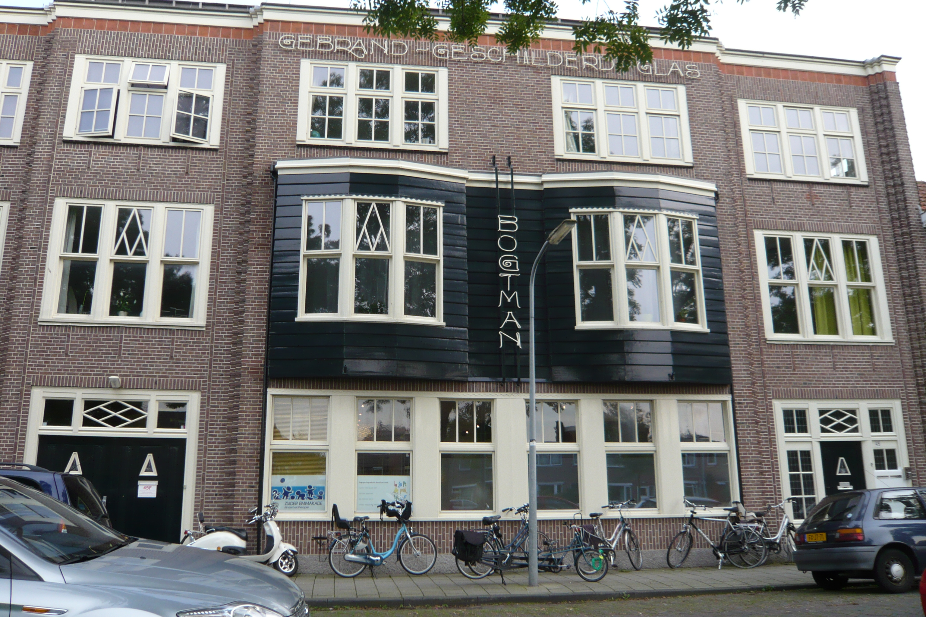 Atelier Bogtman, glazier, Zuider Emmakade 45, Haarlem.